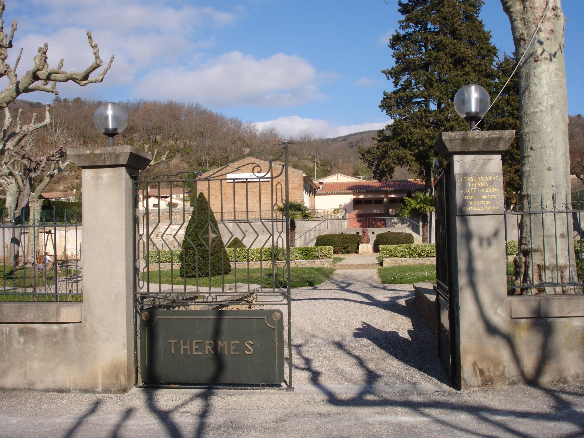 France - Aude (11) - Alet-les-Bains - Thermes d'Alet-les-Bains